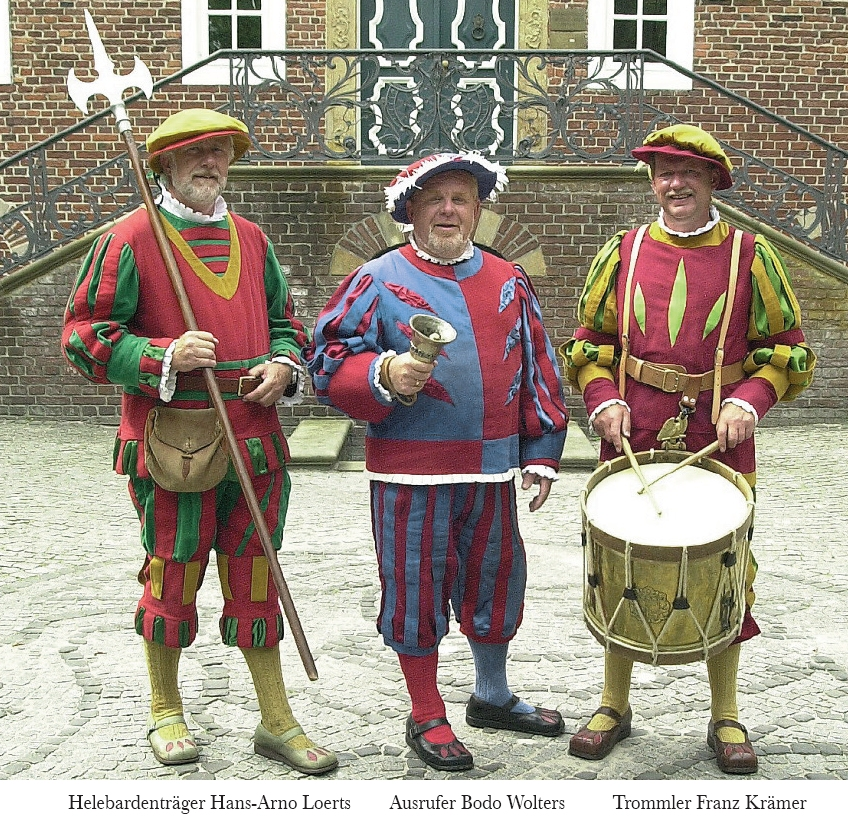 Herolde des Gallimarkt (Leer, 2005)